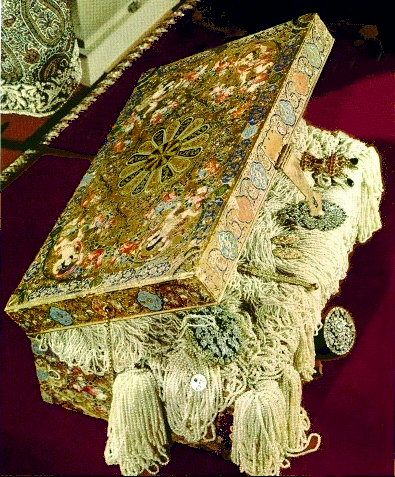 Coffret Persan